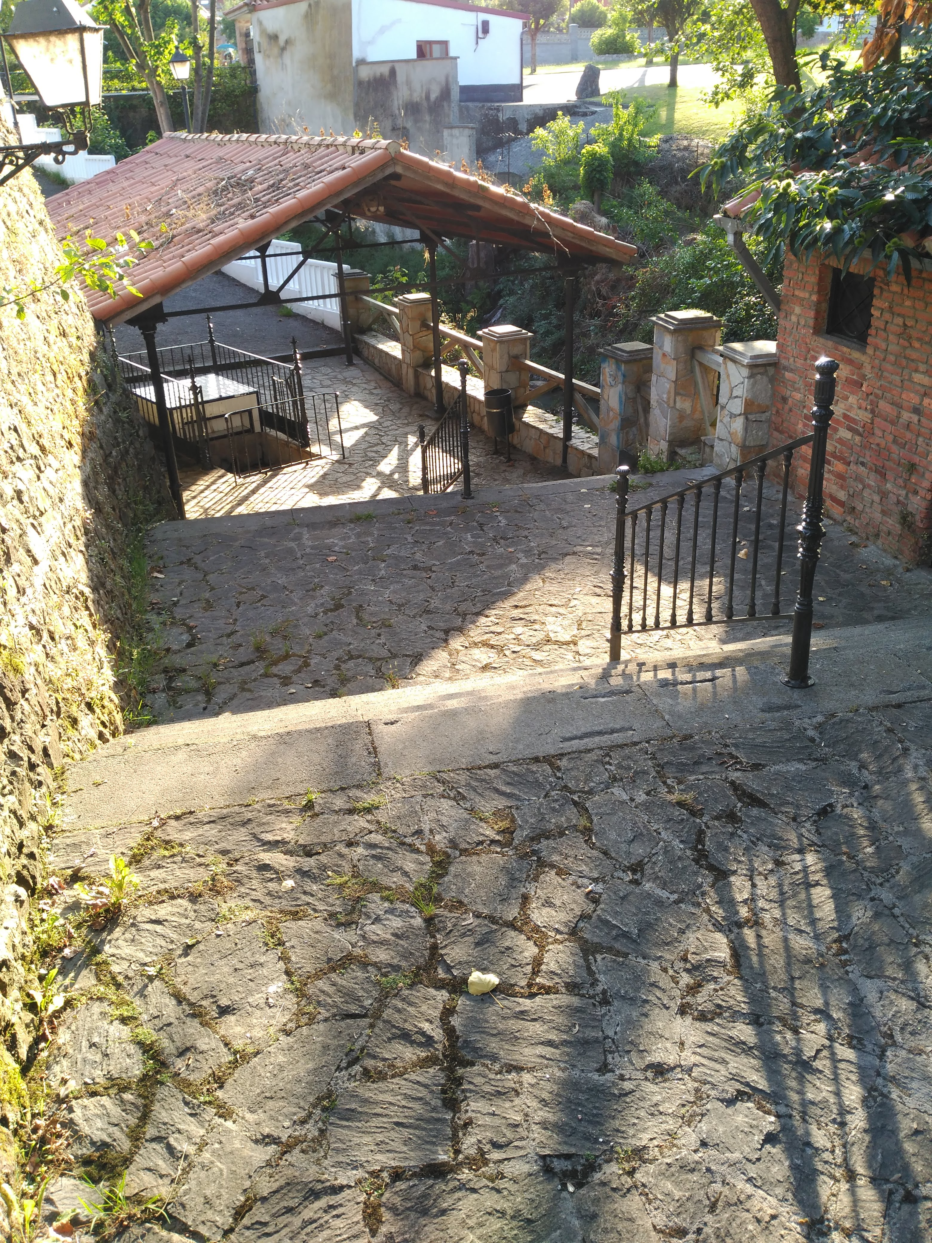 Guente del Güevu en Lada, Langreo (Asturias)